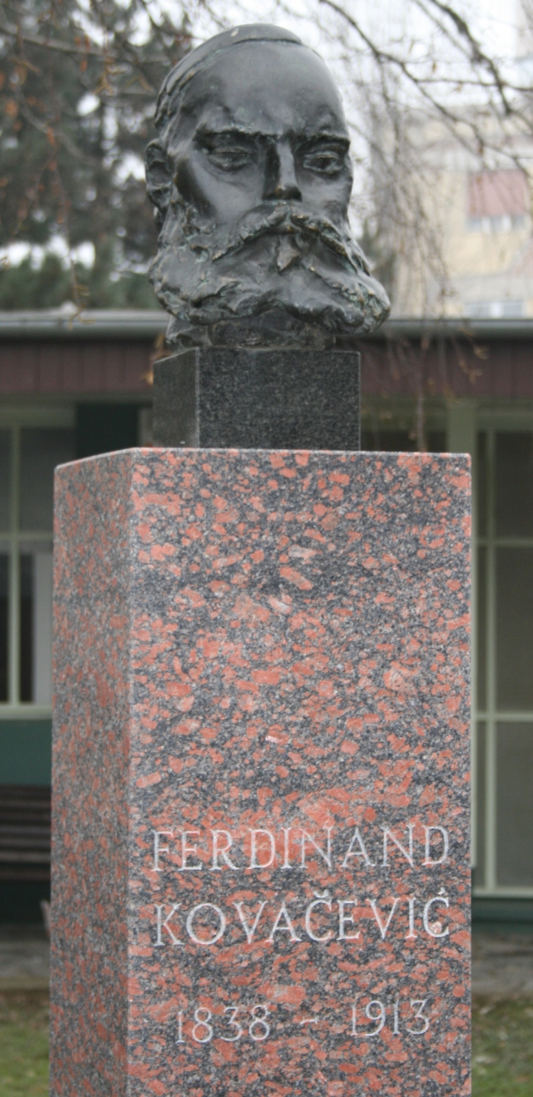 Ferdinand Kovačević, bista pred Tehničkim muzejem u Zagrebu